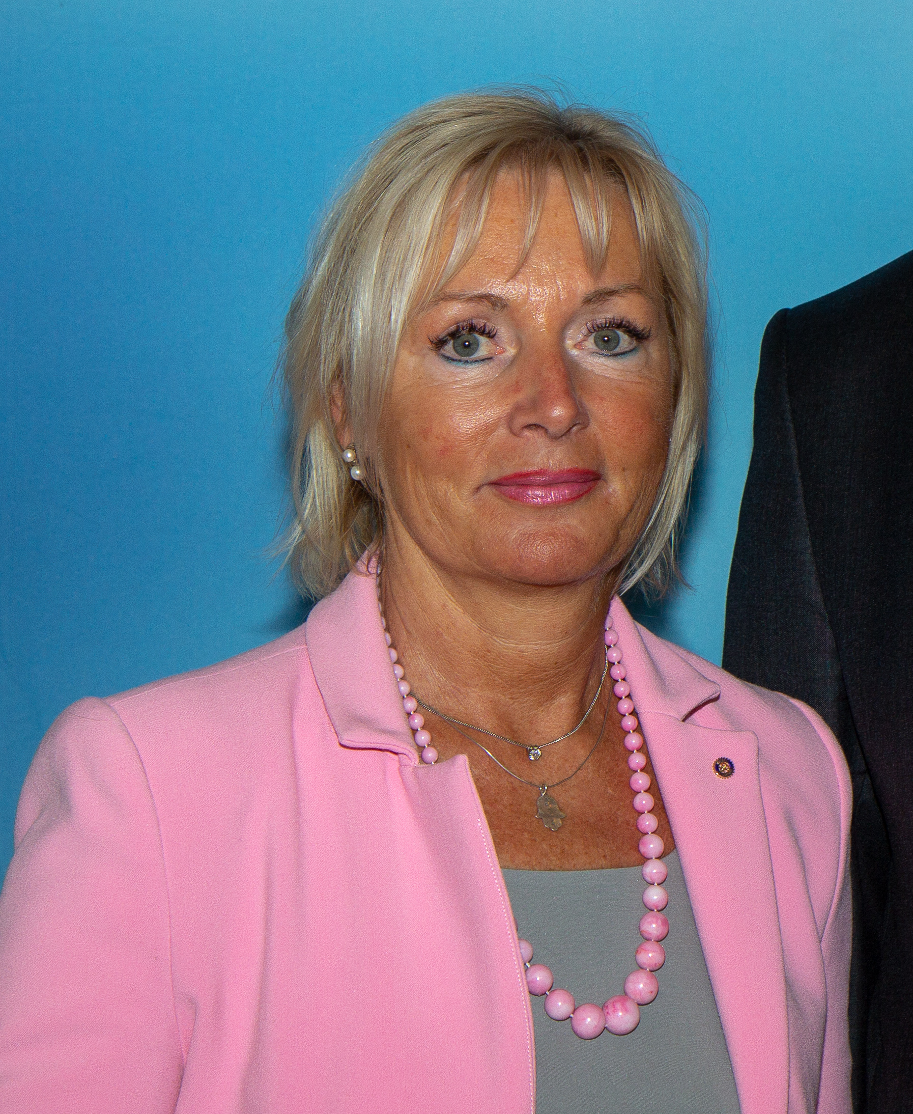 Kristina Sinemus